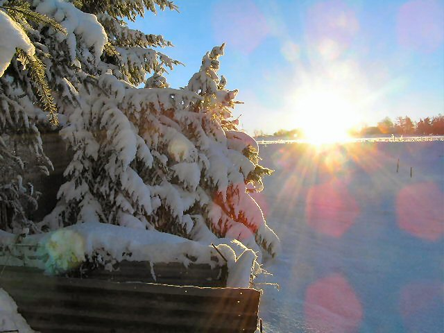 Sonnenaufgang in Böhlen im Winter